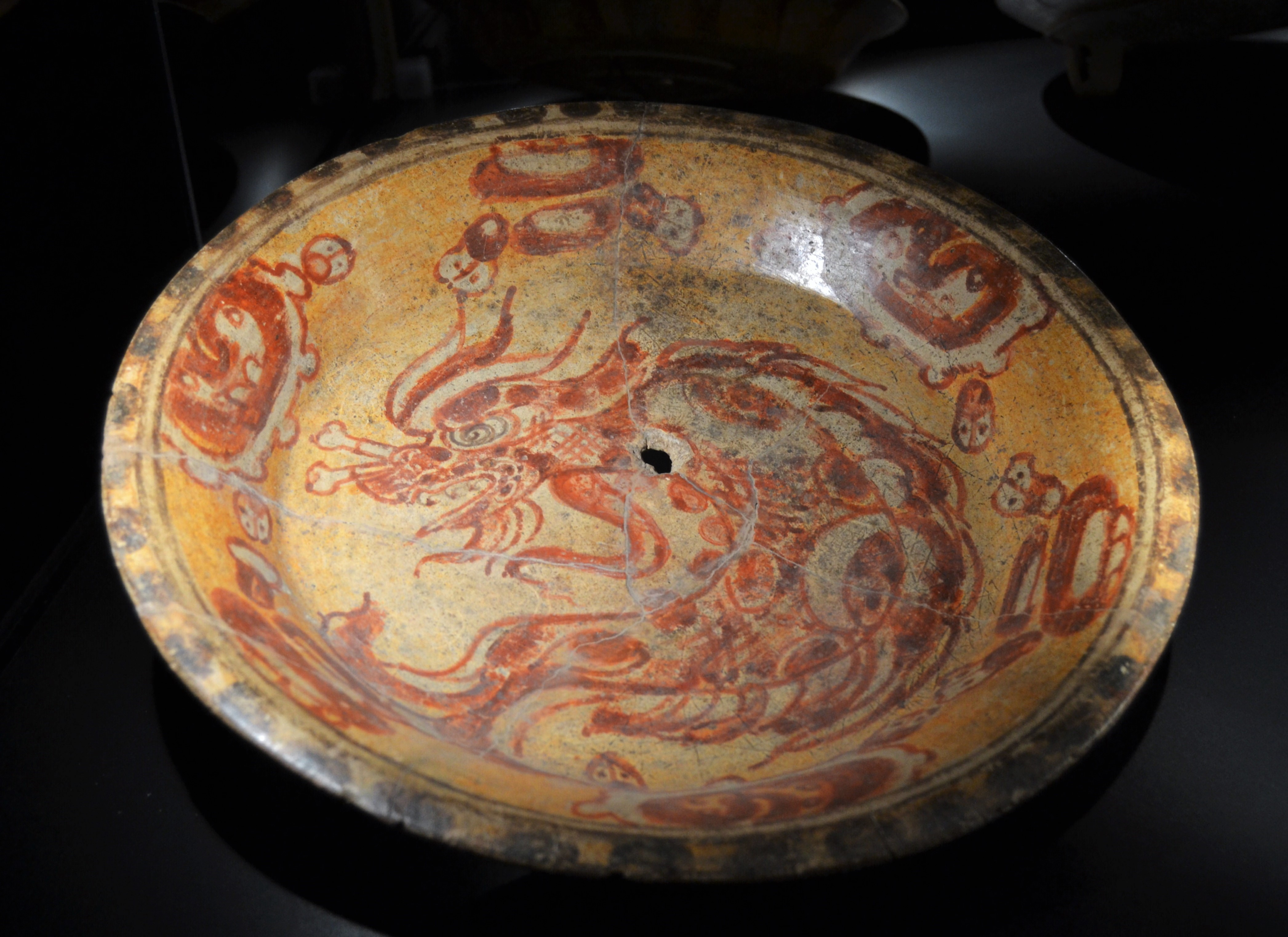 Plat decorat amb un cap de drac, procedència desconeguda. Ceràmica. Període Clàssic (250-900). Fundació La Ruta Maya, Guatemala. Exposició Maies. L'enigma de les Ciutats Perdudes del museu arqueològic d'Alacant.